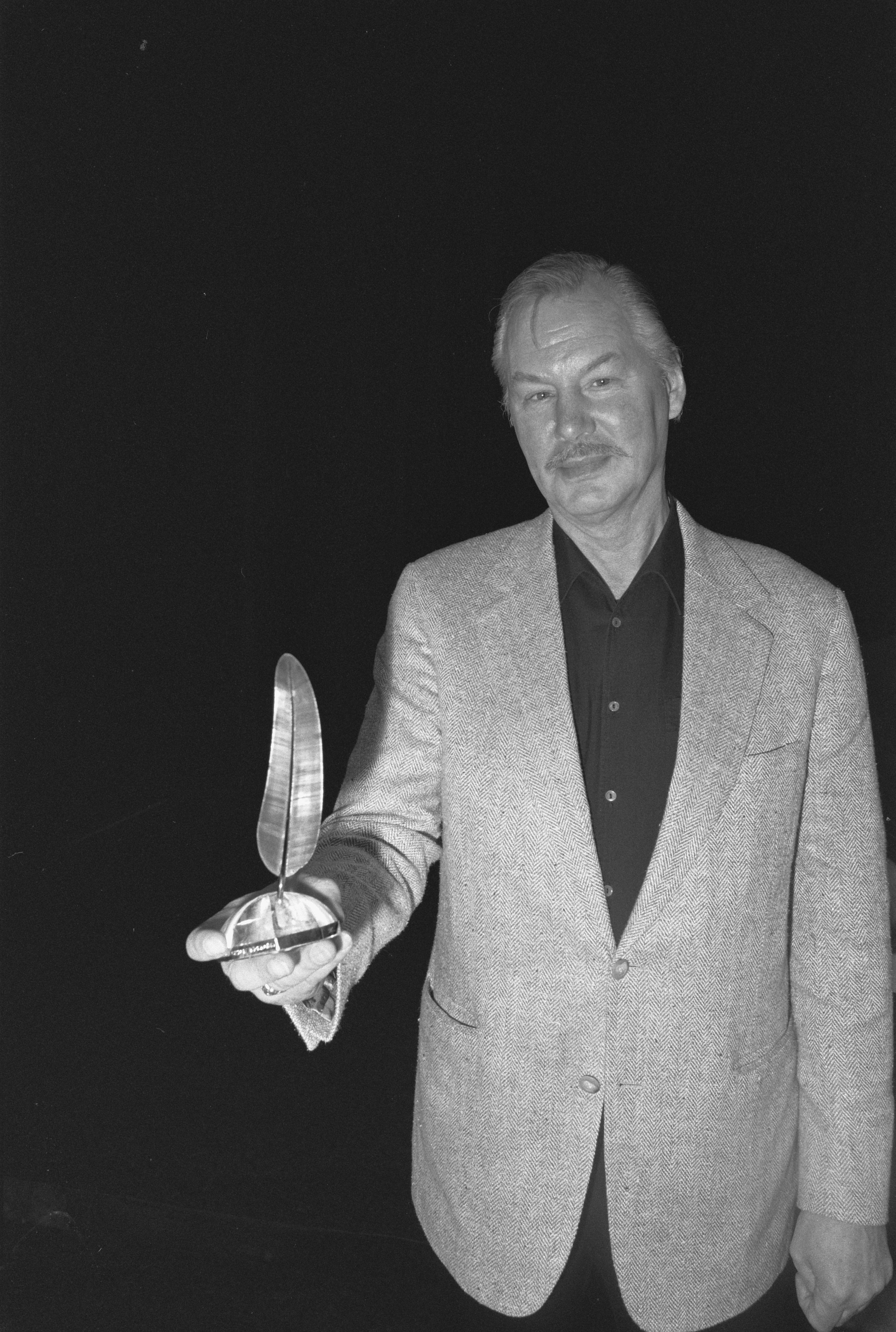 "Armando" met prijs Gouden Ganzeveer, culturele prijs van het Koninklijke Nederlandse Uitgeversverbond (KNUB). Locatie: Amsterdamse Stadsschouwburg